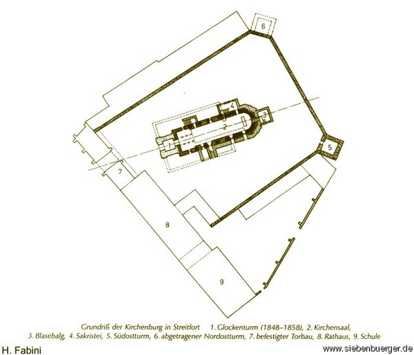 Planul ansamblului fortificat de la Mercheasa.